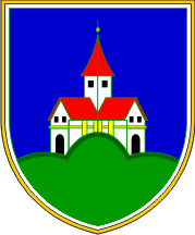 Wappen von Mozirje Slowenien